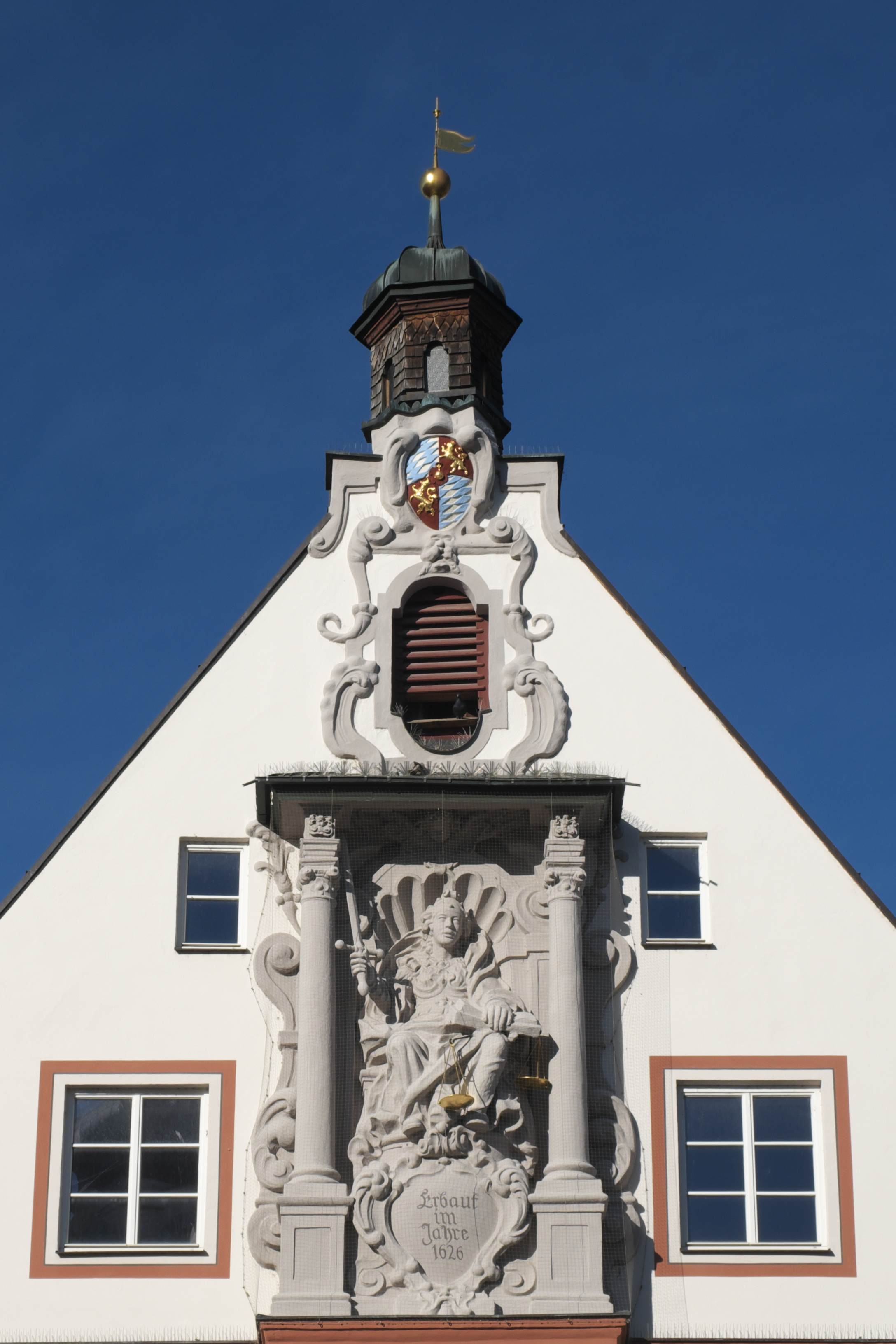 Altes Rathaus in Geisenfeld im Landkreis Pfaffenhofen an der Ilm (Bayern/Deutschland), Giebel mit Dachreiter, Wappen und Figur der Justitia